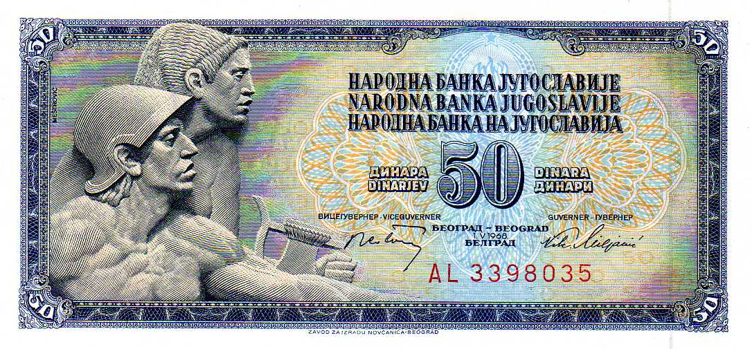 50 Yugoslav dinar (1968) - obverse